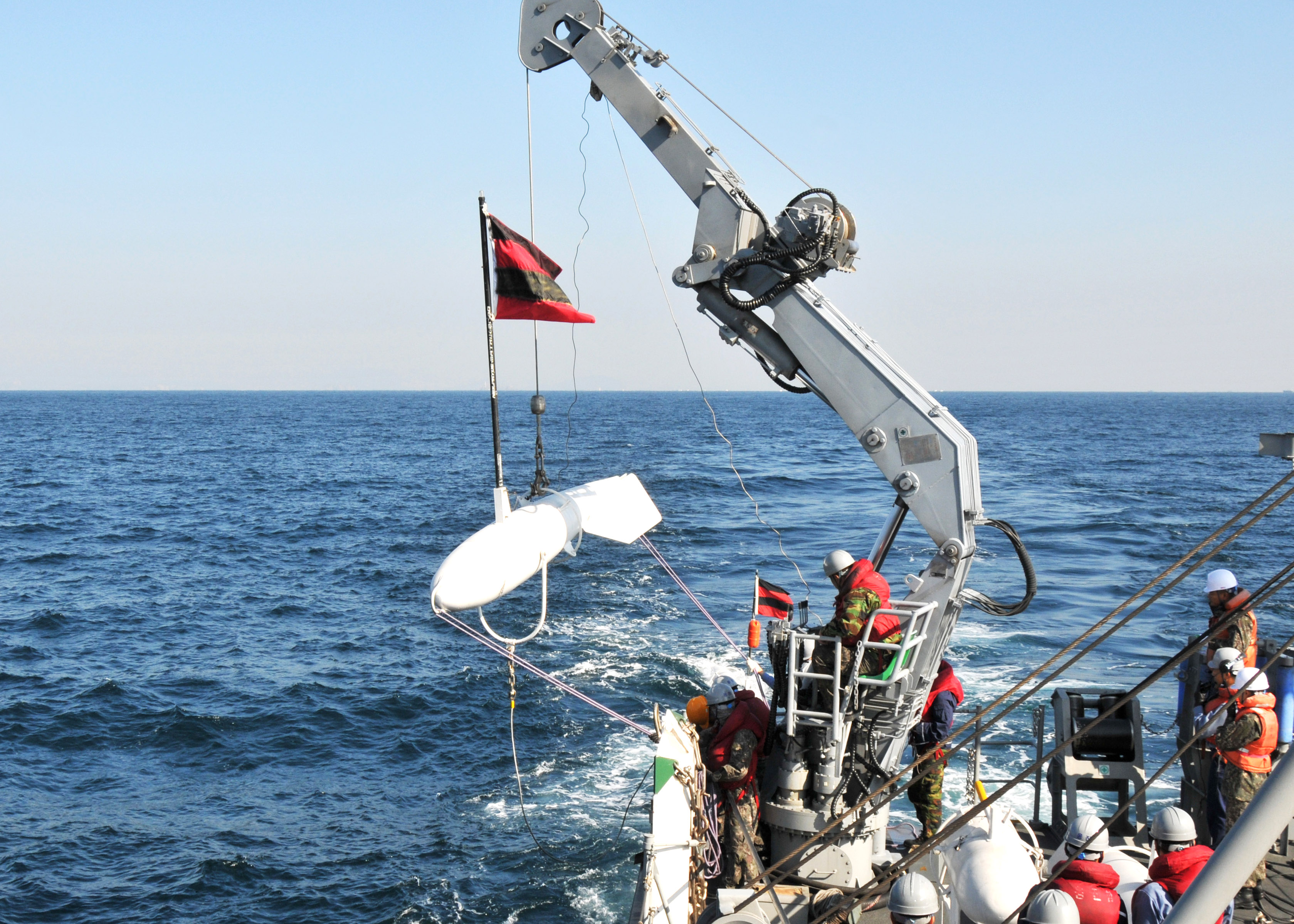 한미 해군은 지난 12일부터 경남 거제도 인근 해상에서 연합 기뢰전 훈련을 실시하였다. 본훈련을 통해 임무수행 능력을 높이고 혈맹관계를 공고히 다지는 성과를 거뒀다 촬영자 : 남기태